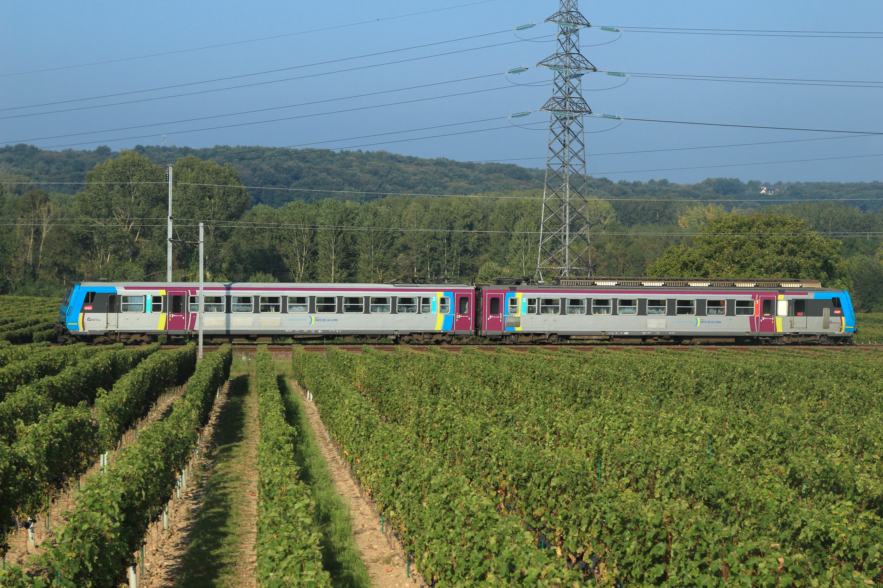 La Z 9609 assurant le TER 860988 Thouars - Saumur du dimanche passe entre les vignes de Chacé et de Varrains.